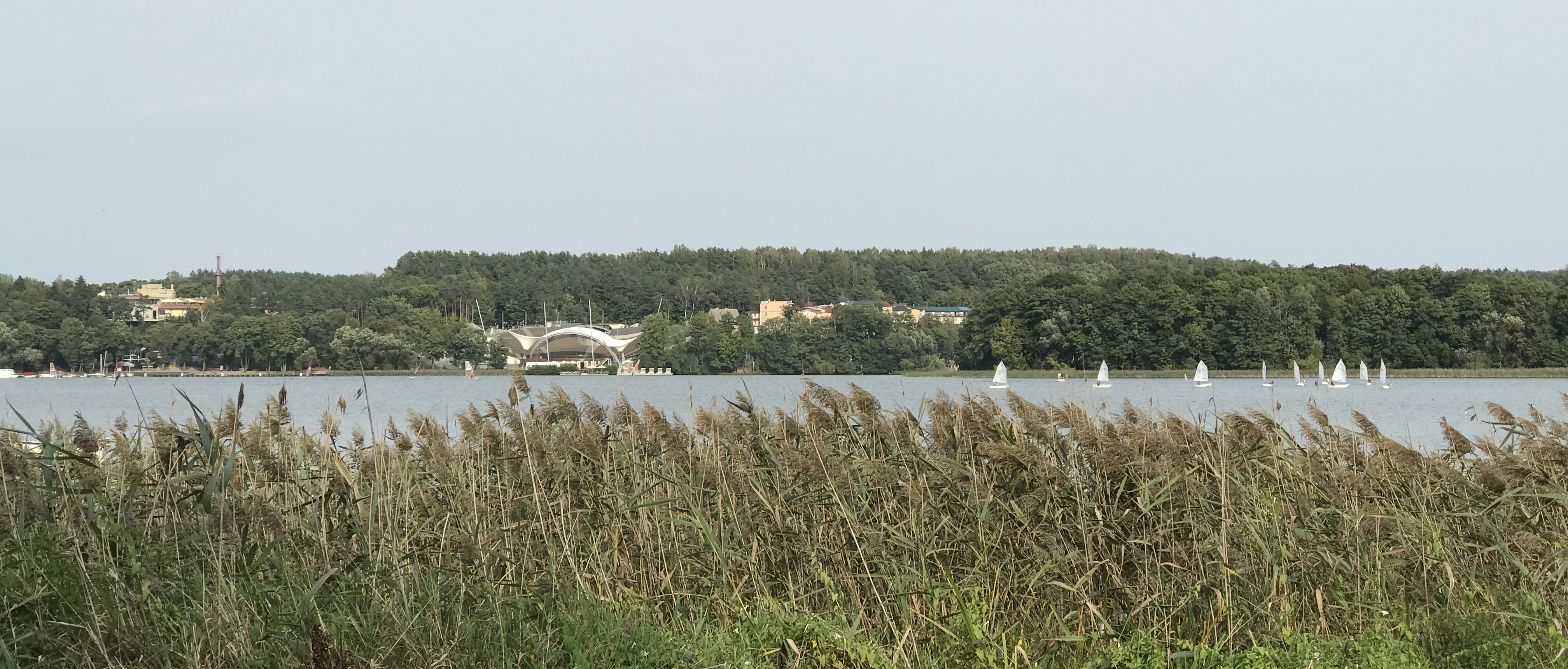 Jezioro Czos w Mrągowie